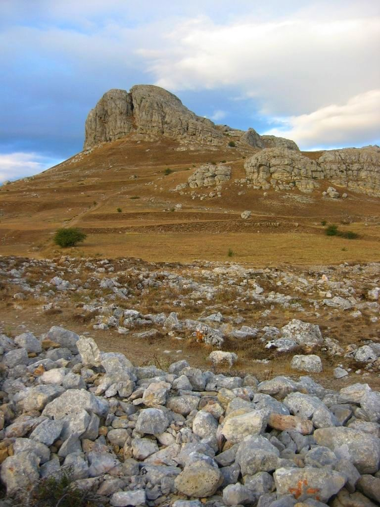 Imagen de la peña del Castillo en Peña Amaya. Este asentamiento abarca desde el siglo X a.C. hasta el siglo XIV d.C. Situado en el extremo meridional de la Lora burgalesa, Peña Amaya se asoma como una adelantada atalaya sobre la campiña castellana. Desde la Prehistoria, las condiciones estratégicas de este favorecido enclave han atraído a muy diversos pobladores. A finales de la Edad del Bronce, en torno al s. X a.C., la presencia humana en el cerro se intensifica, convirtiéndose durante la Edad del Hierro (s. VIII-I a. C.) en uno de los principales castros cántabros, que perdura hasta el último episodio de la conquista romana de la Península (29-19 a. C.). Se funda entonces la ciudad romana de Amaia Patricia, que será tomada por el rey visigodo Leovigildo en el año 574 d. C. Tarik ben Ziyad, caudillo de la invasión árabe, arrasa esta plaza en el año 712 d. C. expulsando al dux Pedro, padre del futuro Alfonso I. Amaya queda deshabitada hasta finales del s. IX (860 d. C.) cuando el conde Rodrigo, por orden de Ordoño I, repuebla este lugar, que pronto pasa a convertirse en una de las plazas más importantes de la primera frontera de la Reconquista cristiana. La villa medieval permanecerá en el cerro, amparada por la fortaleza que se alza en el punto más alto, hasta que, probablemente en el S. XII, la población se traslade a l llanura inmediata. El castillo, como sede del poder señorial, continúa en uso al menos hasta entrado el s. XIV. De esta dilatada historia hoy podemos observar la trinchera de acceso al castro posiblemente cántabra, las ruinas del pueblo medieval, que tal vez reaprovechó estructuras más antiguas, las murallas que defendieron el castillo y, en la cima, apenas vestigios de la imponente fortaleza que señoreó Amaya.